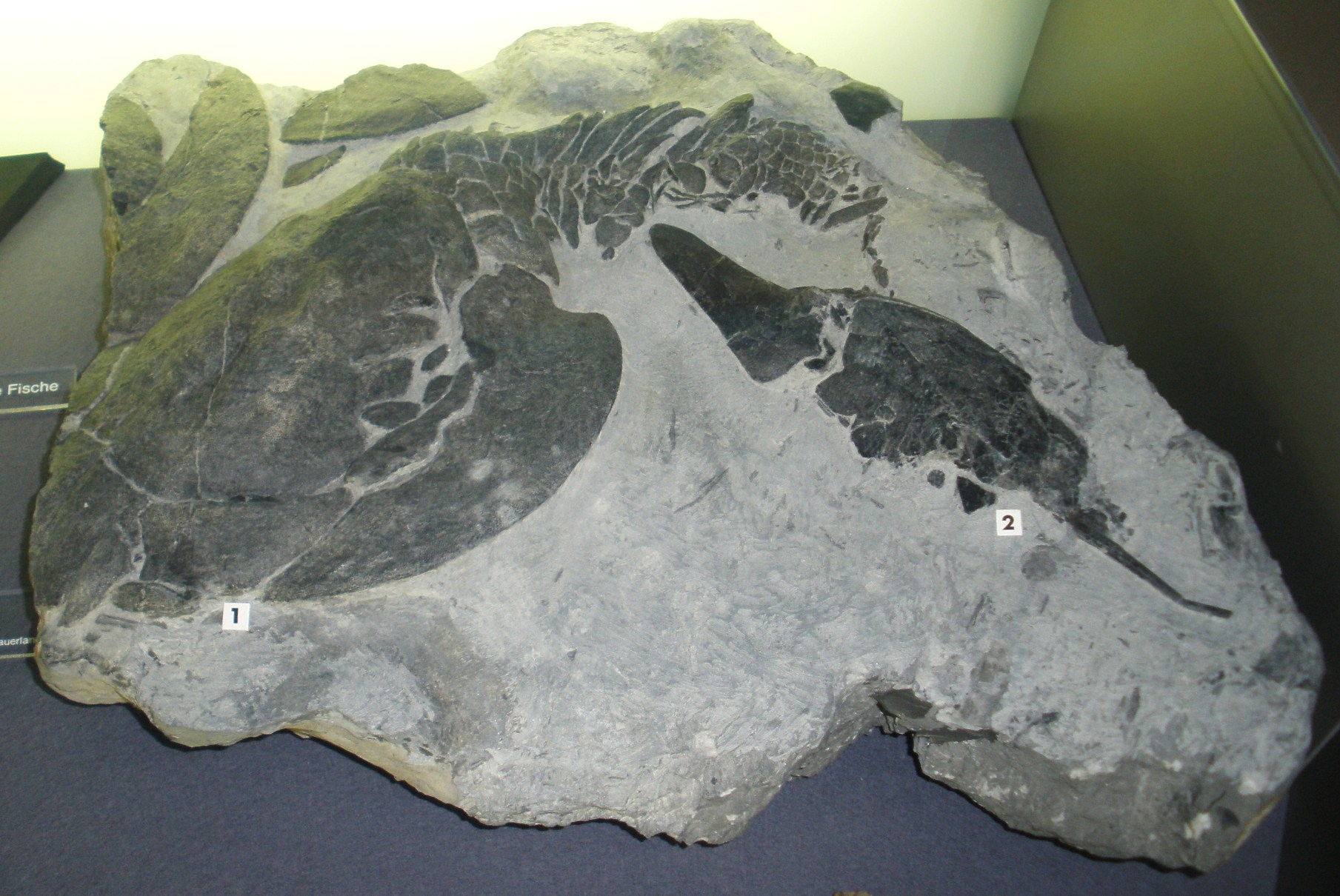 Fossil of Drepanaspis and Pteraspis, extinct agnathans- Took the photo at Senckenberg Museum of Frankfurt